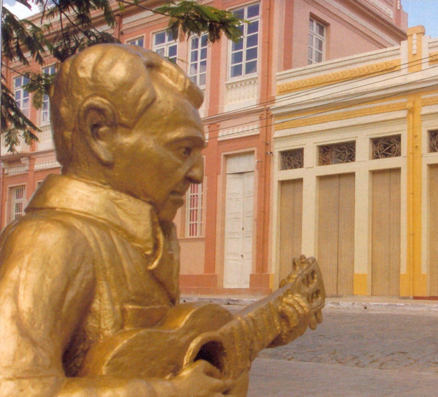 ze do cavaquinho